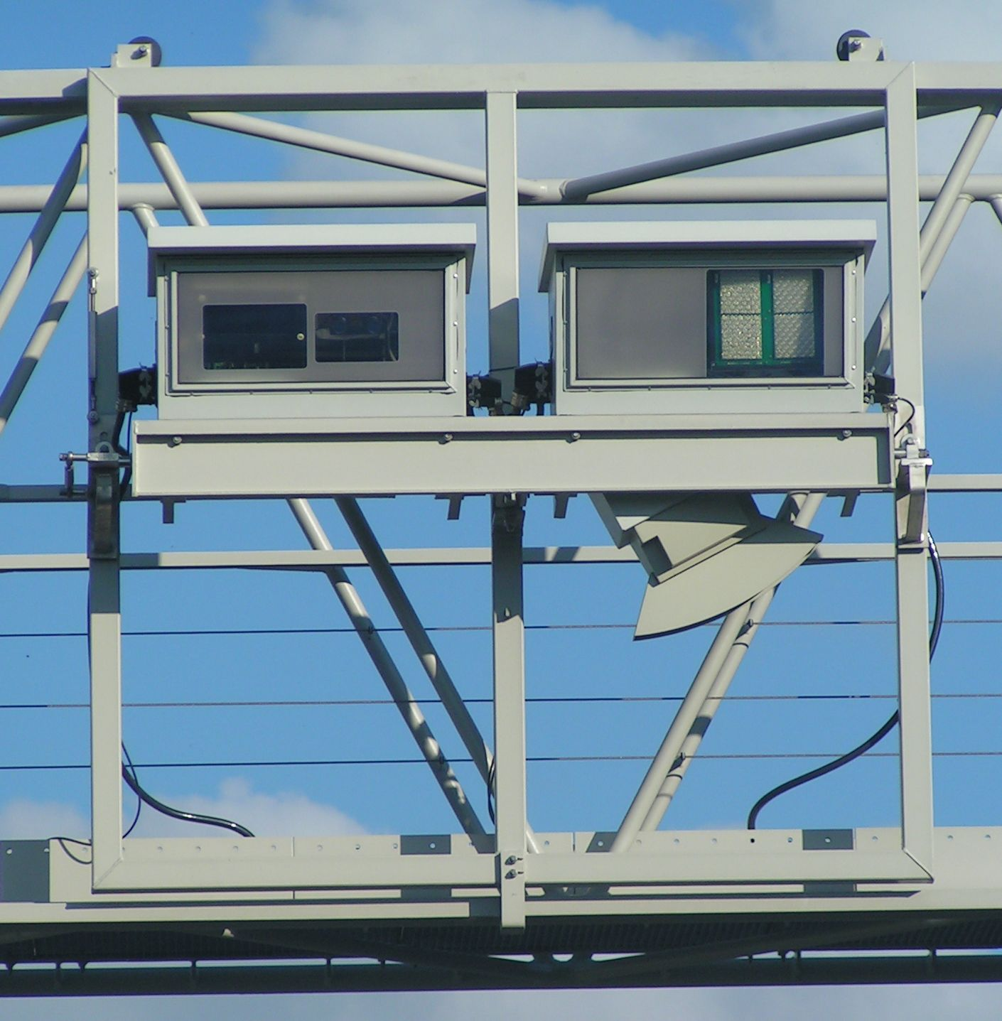 LKW Maut, Messbrücke, Detail, Germany